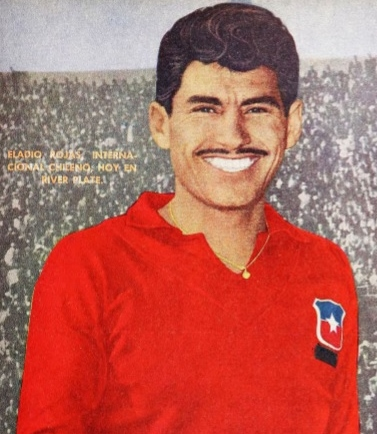 Eladio Rojas, volante de la selección chilena que obtuvo el tercer lugar en el Mundial de 1962.